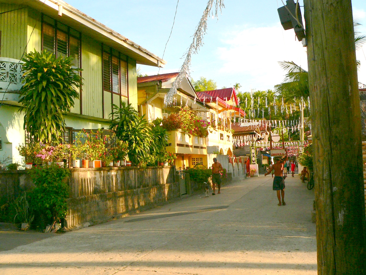 Zumarraga, Samar, Philippines